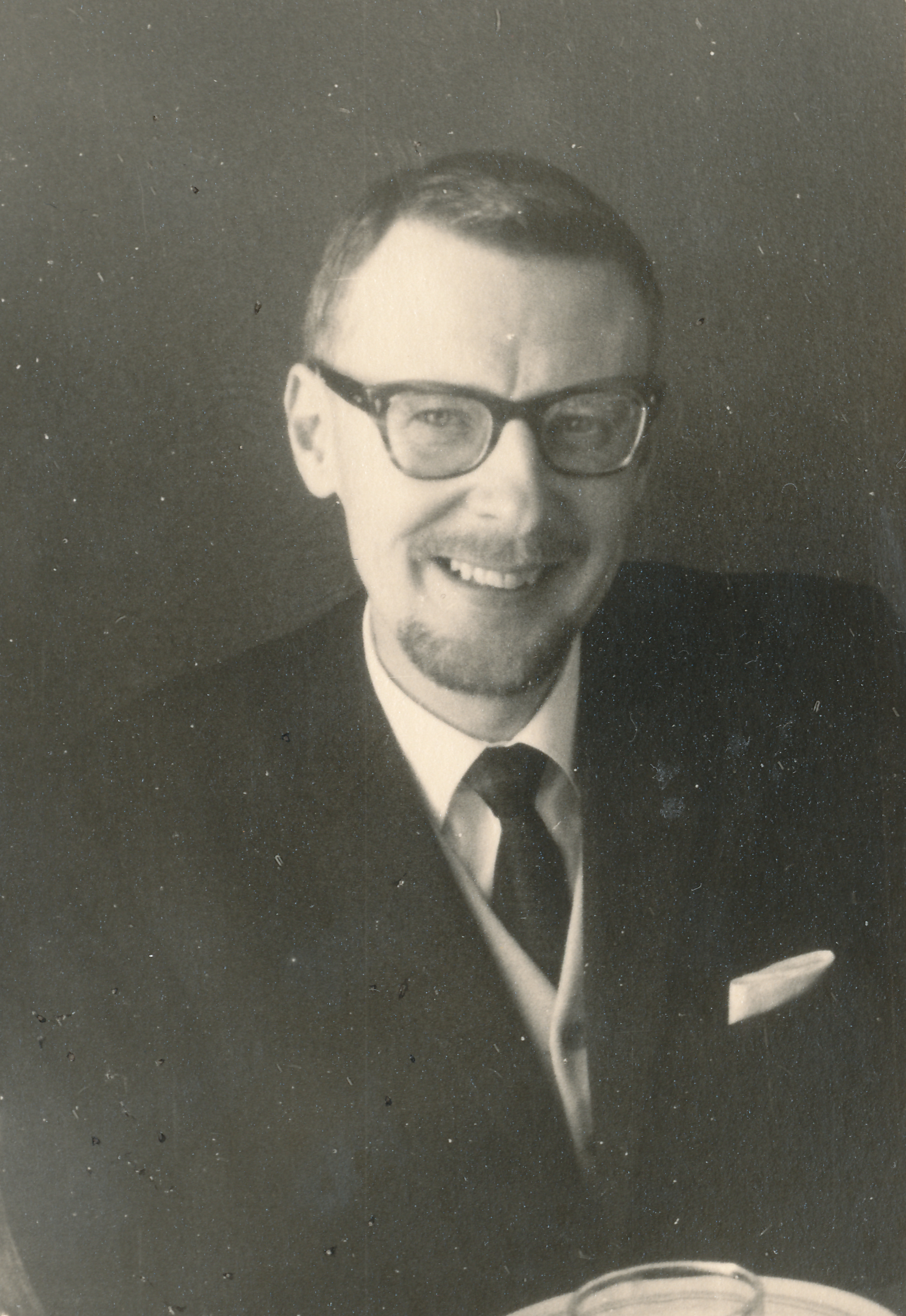 Sven Lidman, ca 1960.